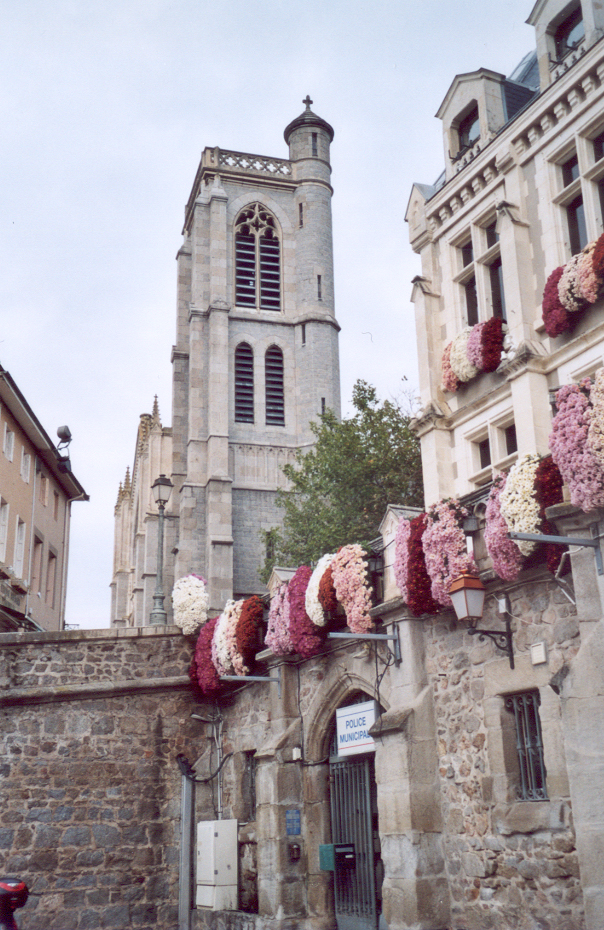 Église Saint-Galmier.